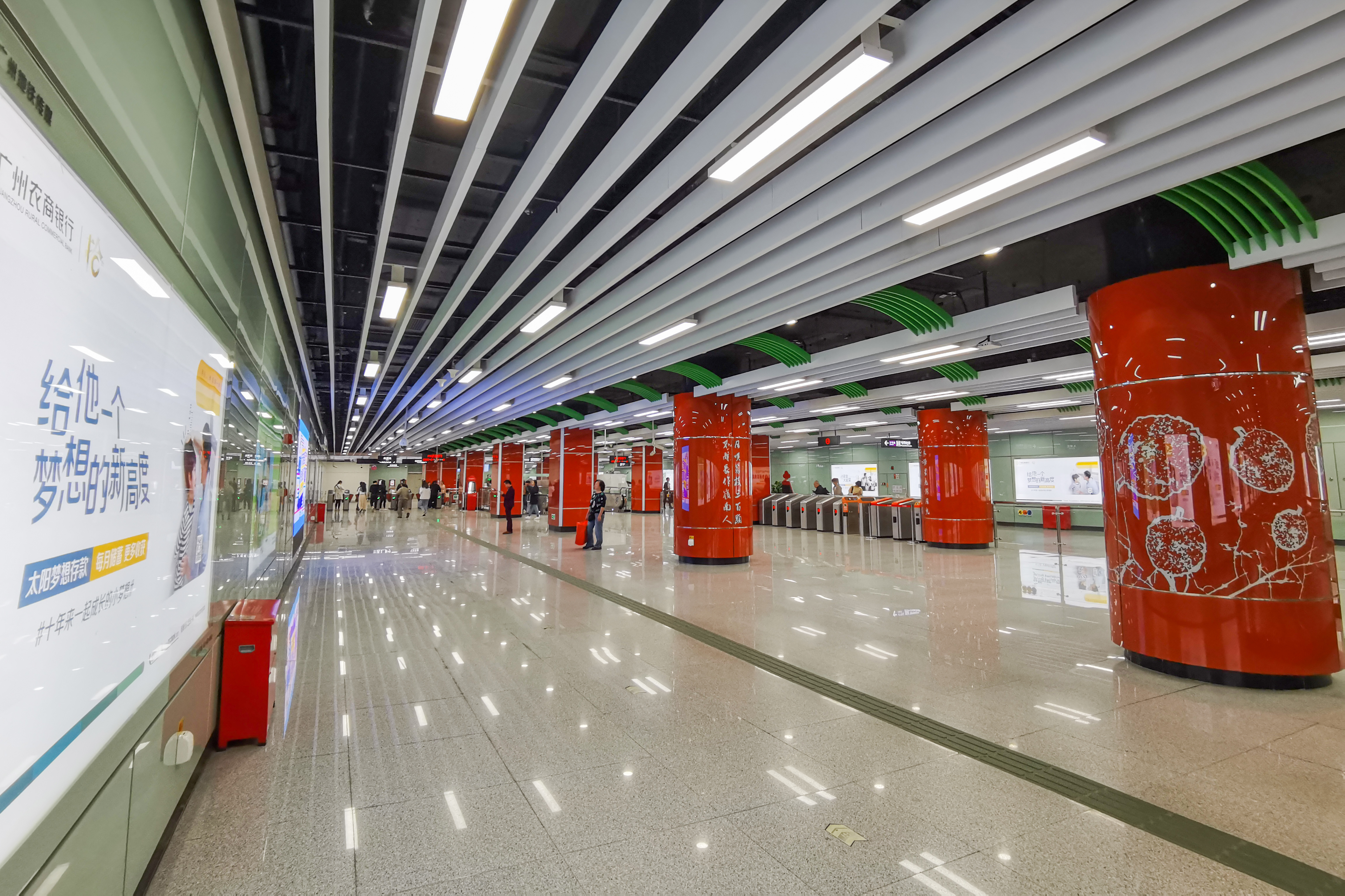 广州地铁增城广场站